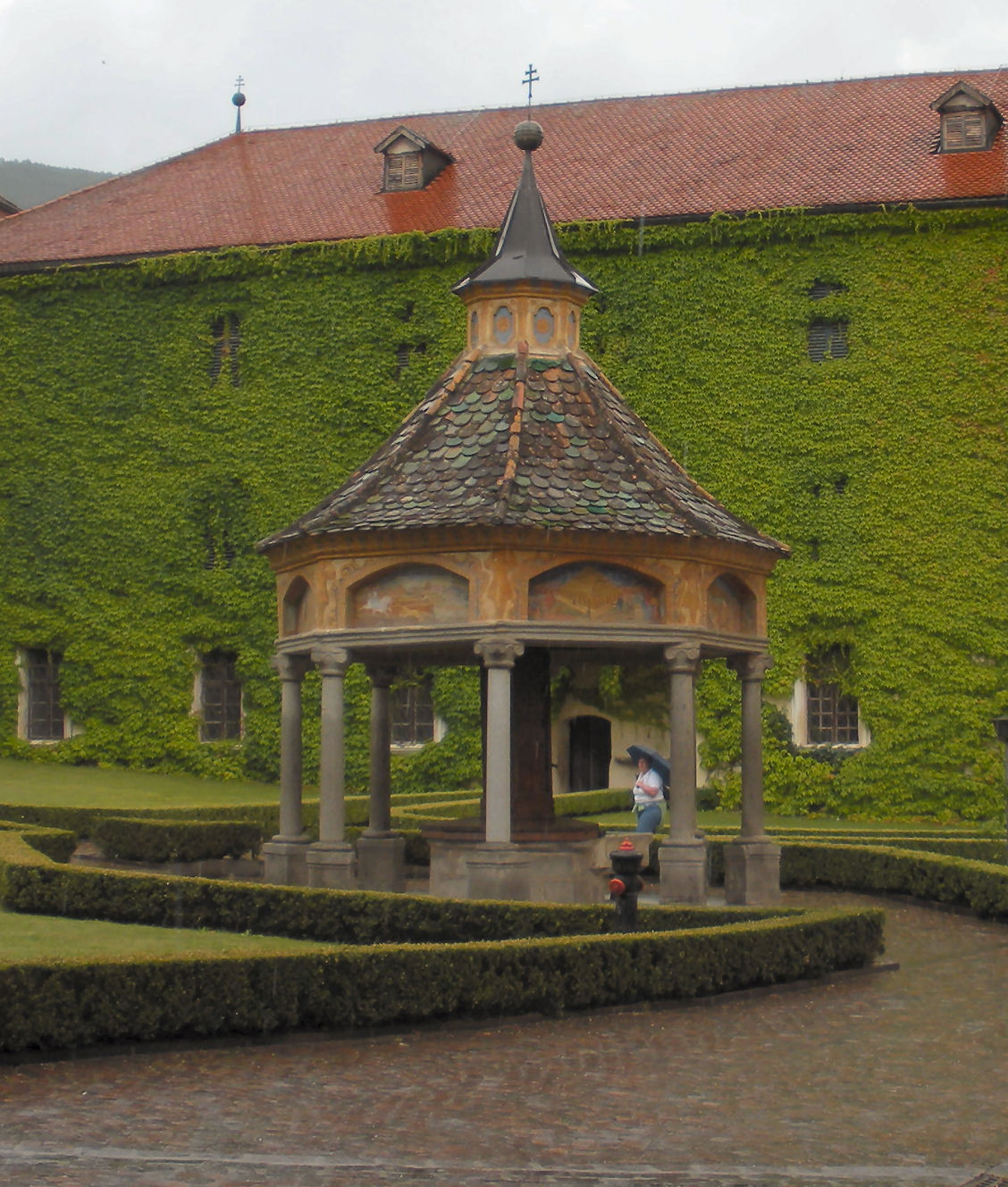 Abbazia di Novacella (Varna, BZ), il Pozzo delle Meraviglie Foto propria Luglio 2009